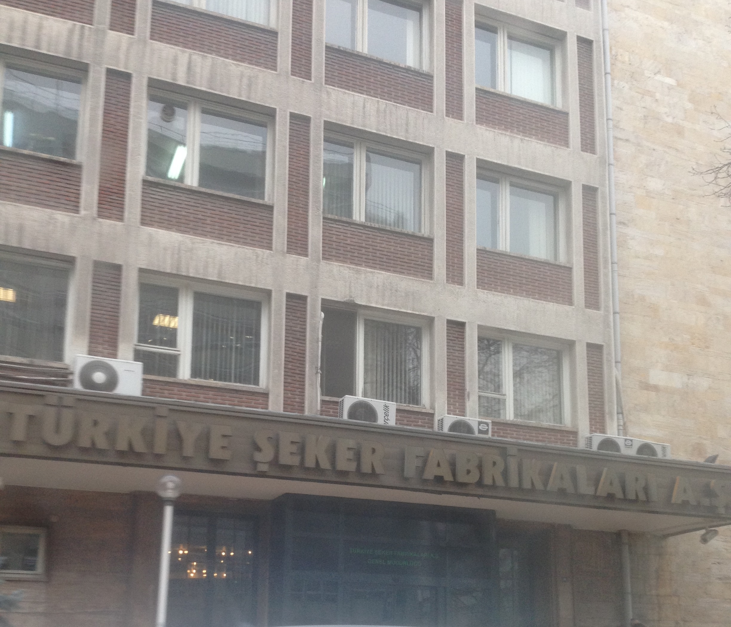 Ankara'dan çeşitli görüntüler